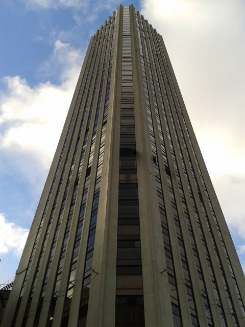 Torre Colpatria